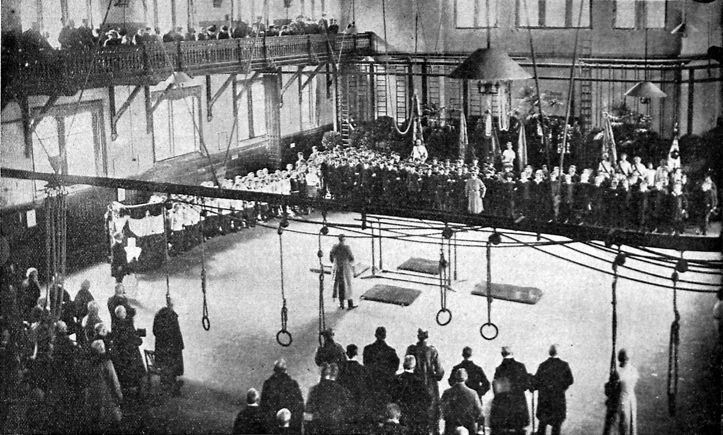 Die Lübecker Hundertjahrfeier des deutschen Turnens in der Hauptturnhalle. Ansprache des stellvertretenden kommandierenden Generals des IX. Armee-Korps v. Falk.